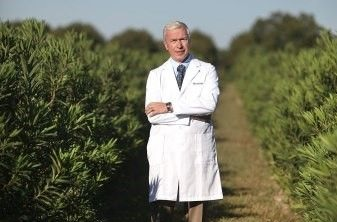 Newman frente a la plantación de Nerium oleander más grande del mundo, ubicada en Hondo, Texas, Estados Unidos de América.